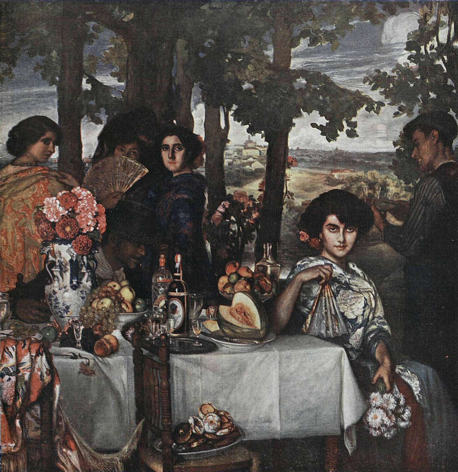 A plena vida, obra del pintor José Pinazo Martínez, recogido en la revista española La Esfera.